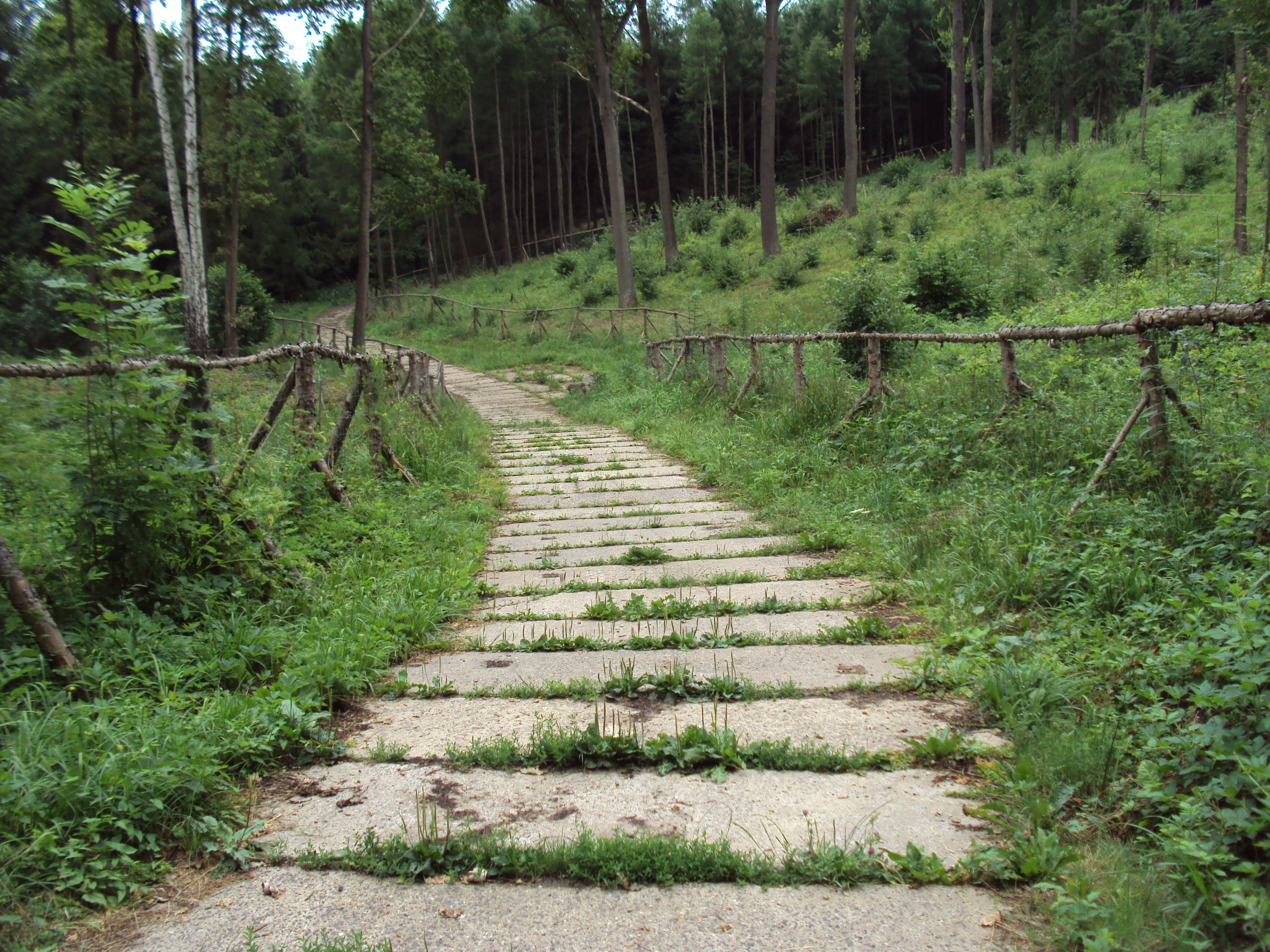 Cyklostezka z České Lípy na Písečnou, u sídliště Špičák